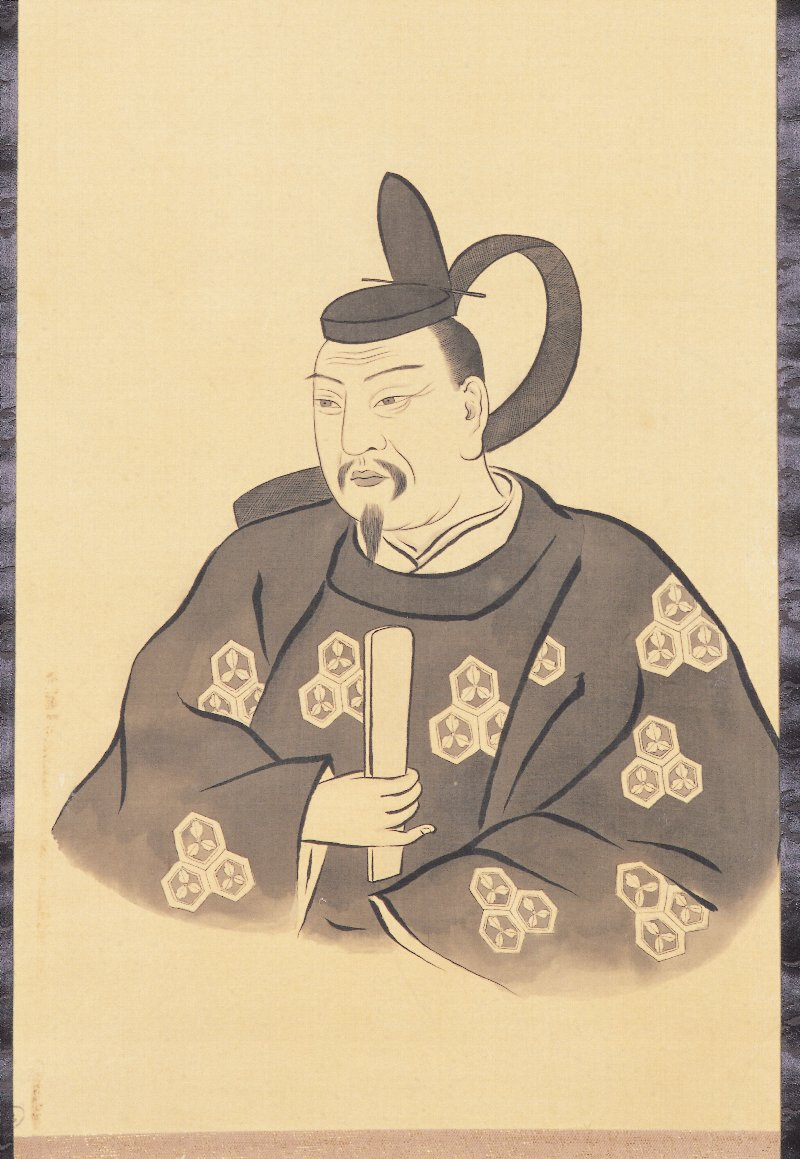 16~17世紀の武将・直江兼続の肖像画